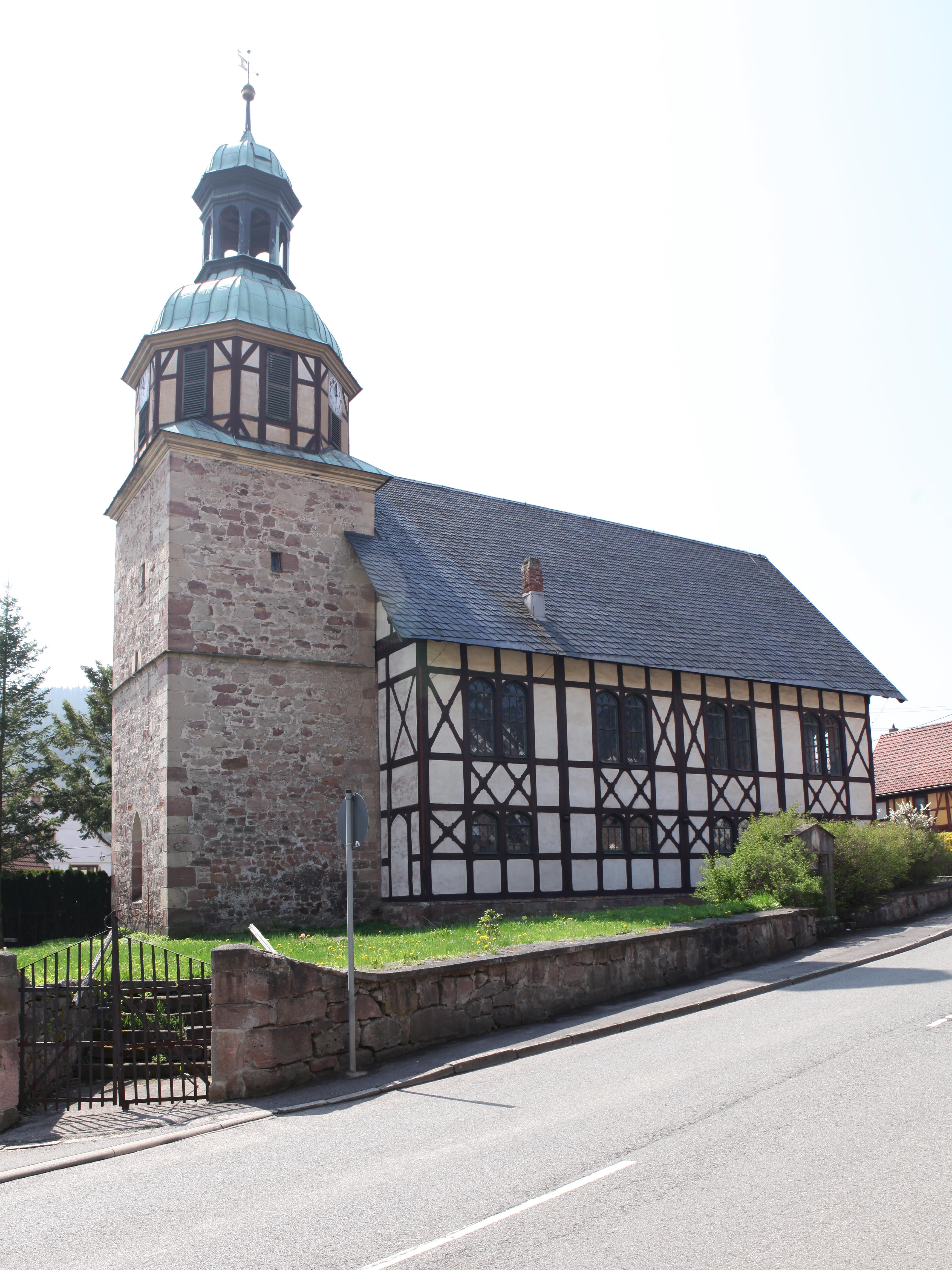 Kirche St. Bonifatius, Kirchenschiff 1855, in Wichtshausen, Ot von Suhl